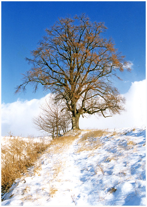 Památná lípa nad Libání.